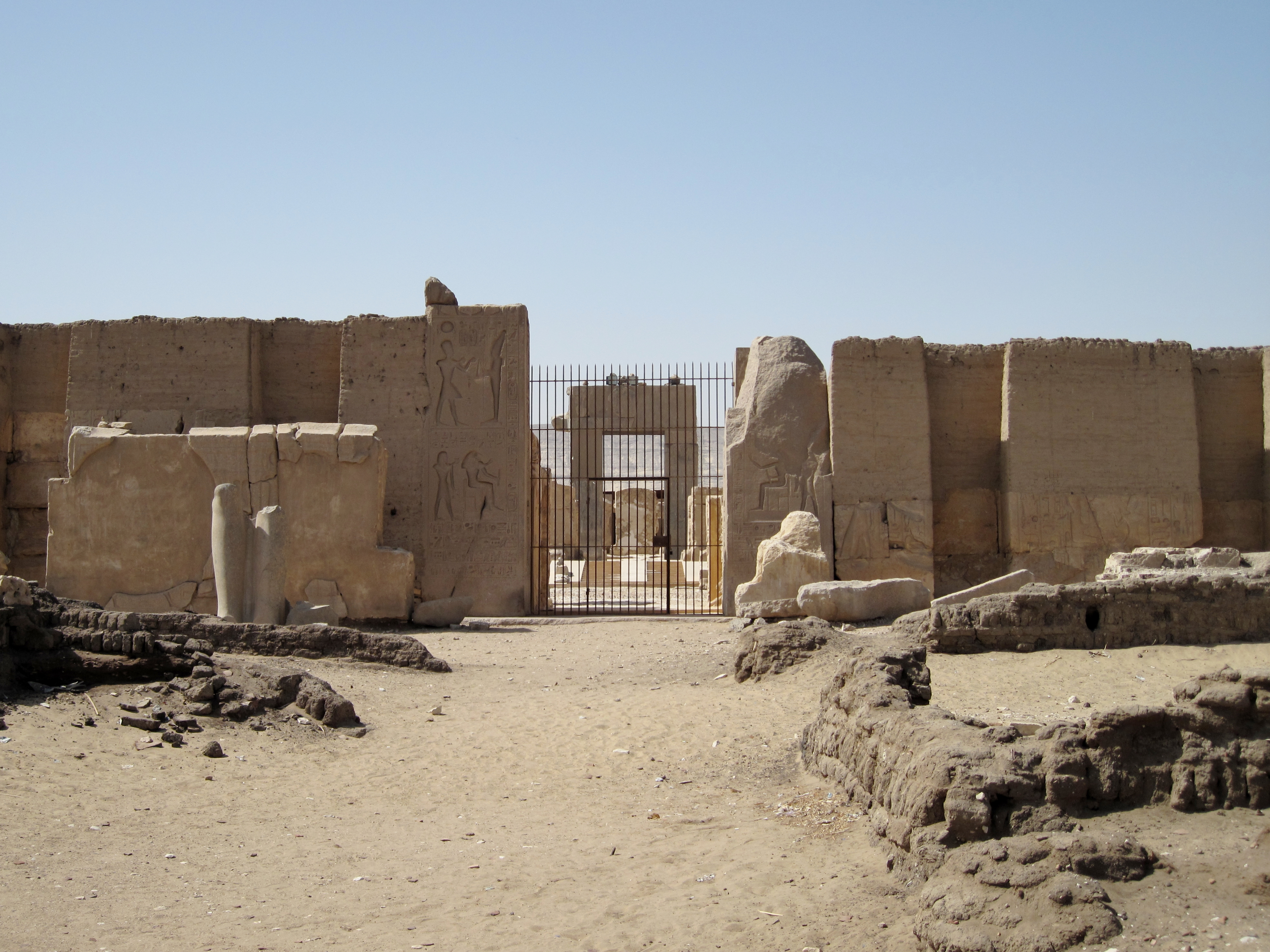 Eingangsbereich zum zweiten Hof des Tempels Ramses II. in Abydos, Ägypten